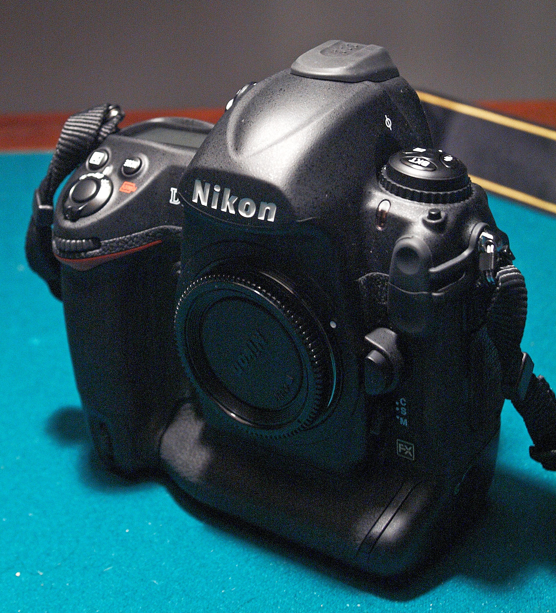 nikon d3